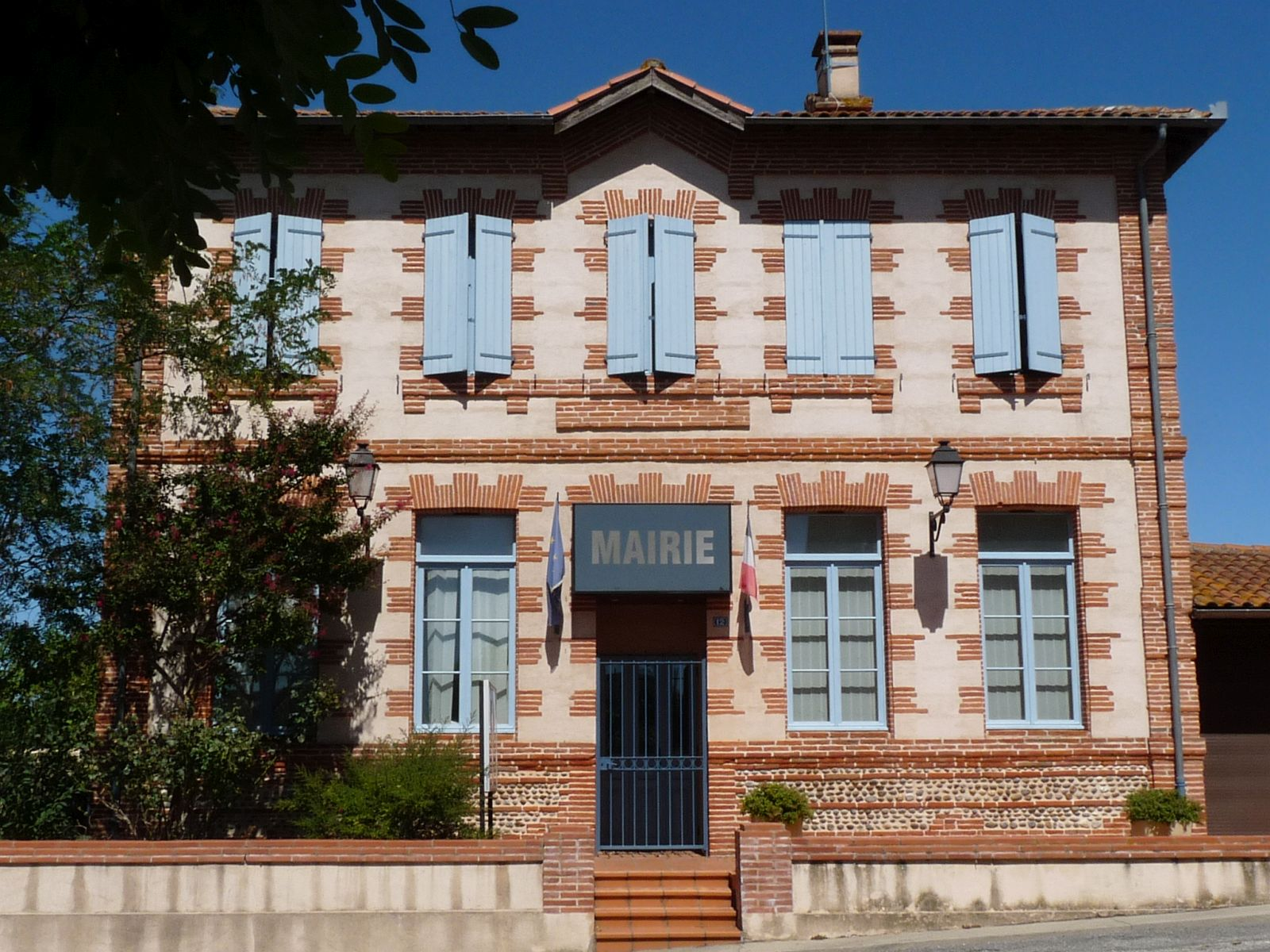 Mairie de Mauvaisin, Haute-Garonne, France